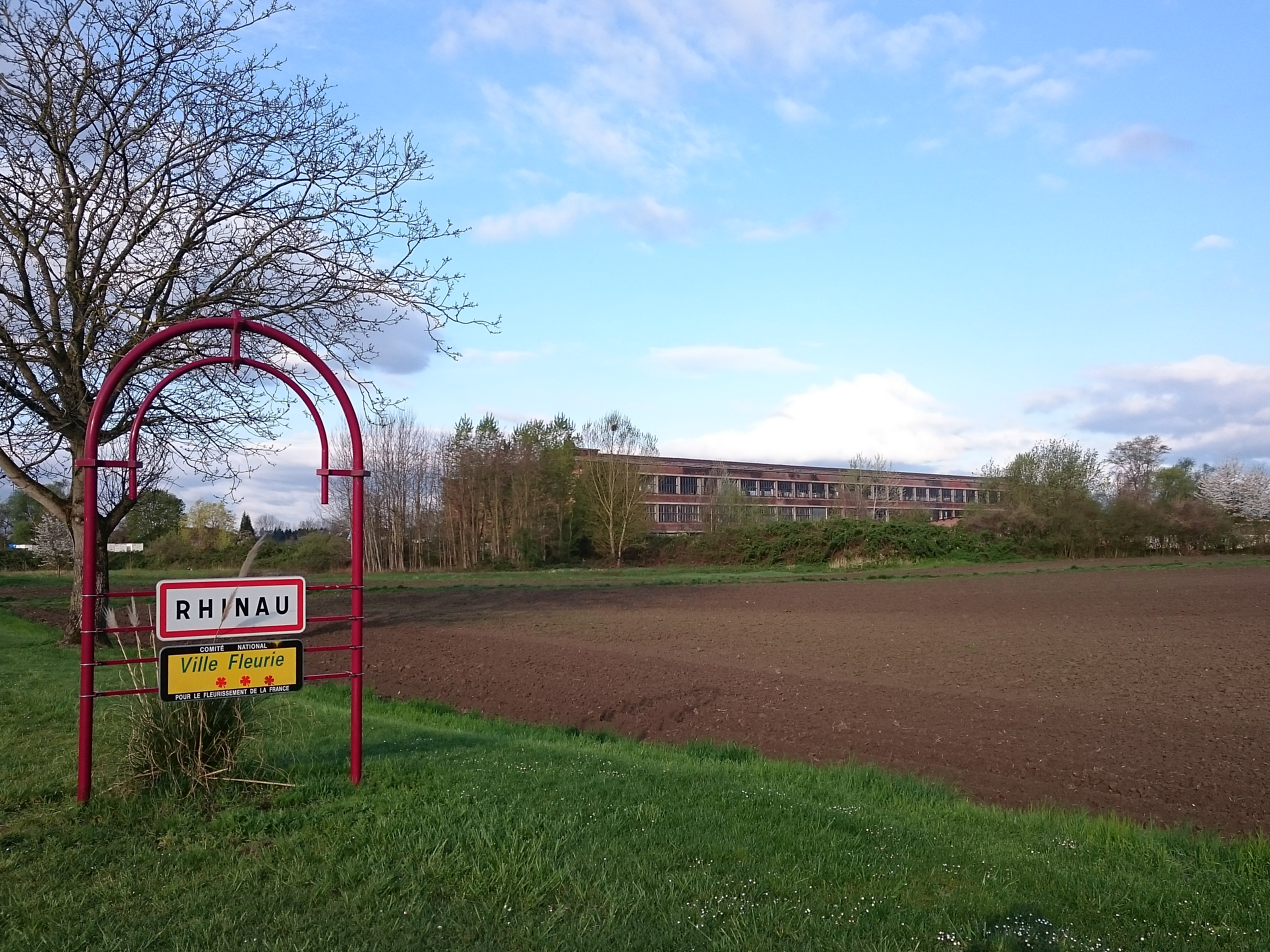 Entrée de Rhinau et usine List depuis la rue de Daubensand